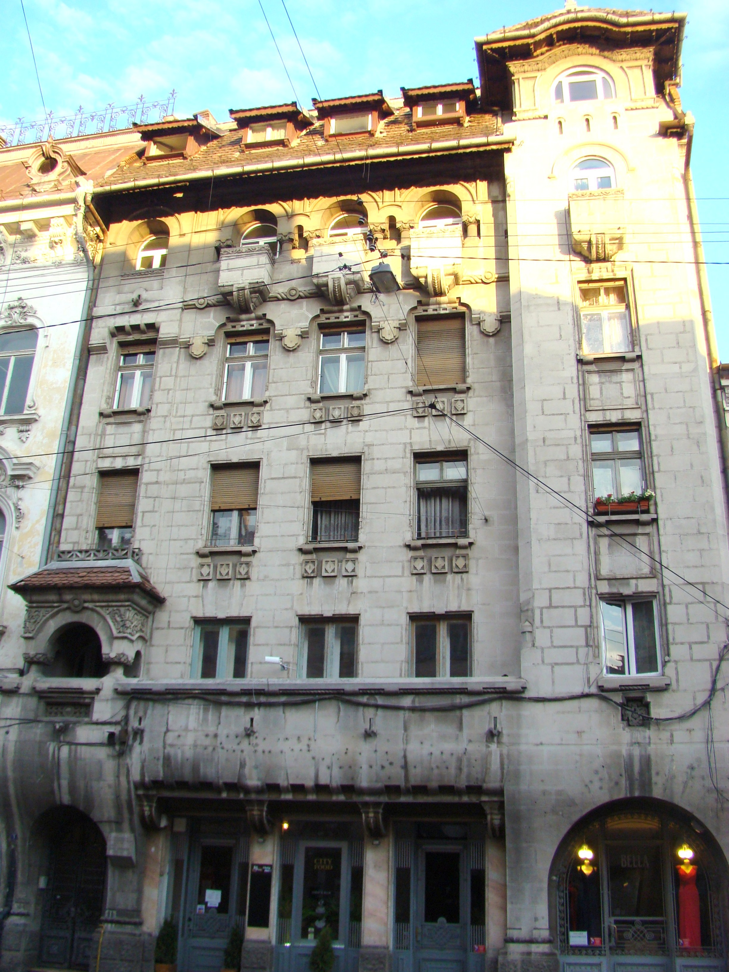 Clădire monument istoric, str.Napoca, nr.3